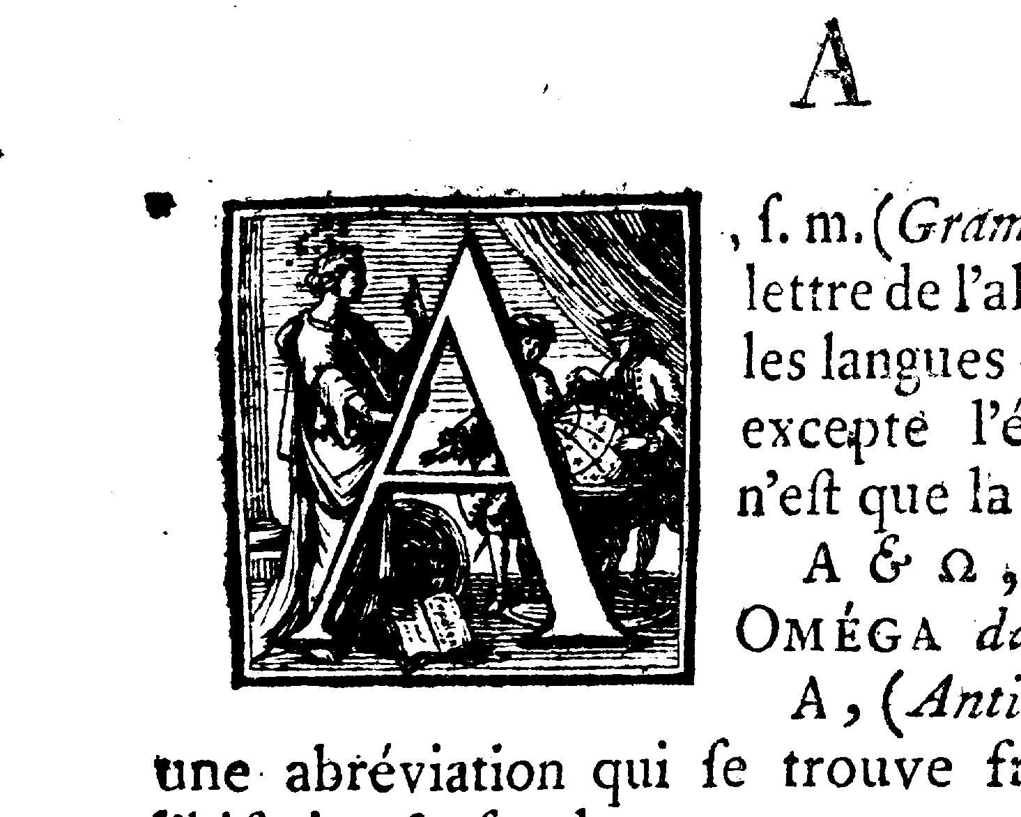 ornamental letter (A)